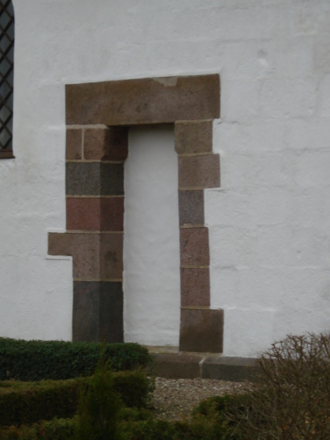 Den tilmurede norddør (kvindedør) i Gangsted Kirke